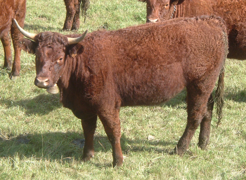 Vaches Salers